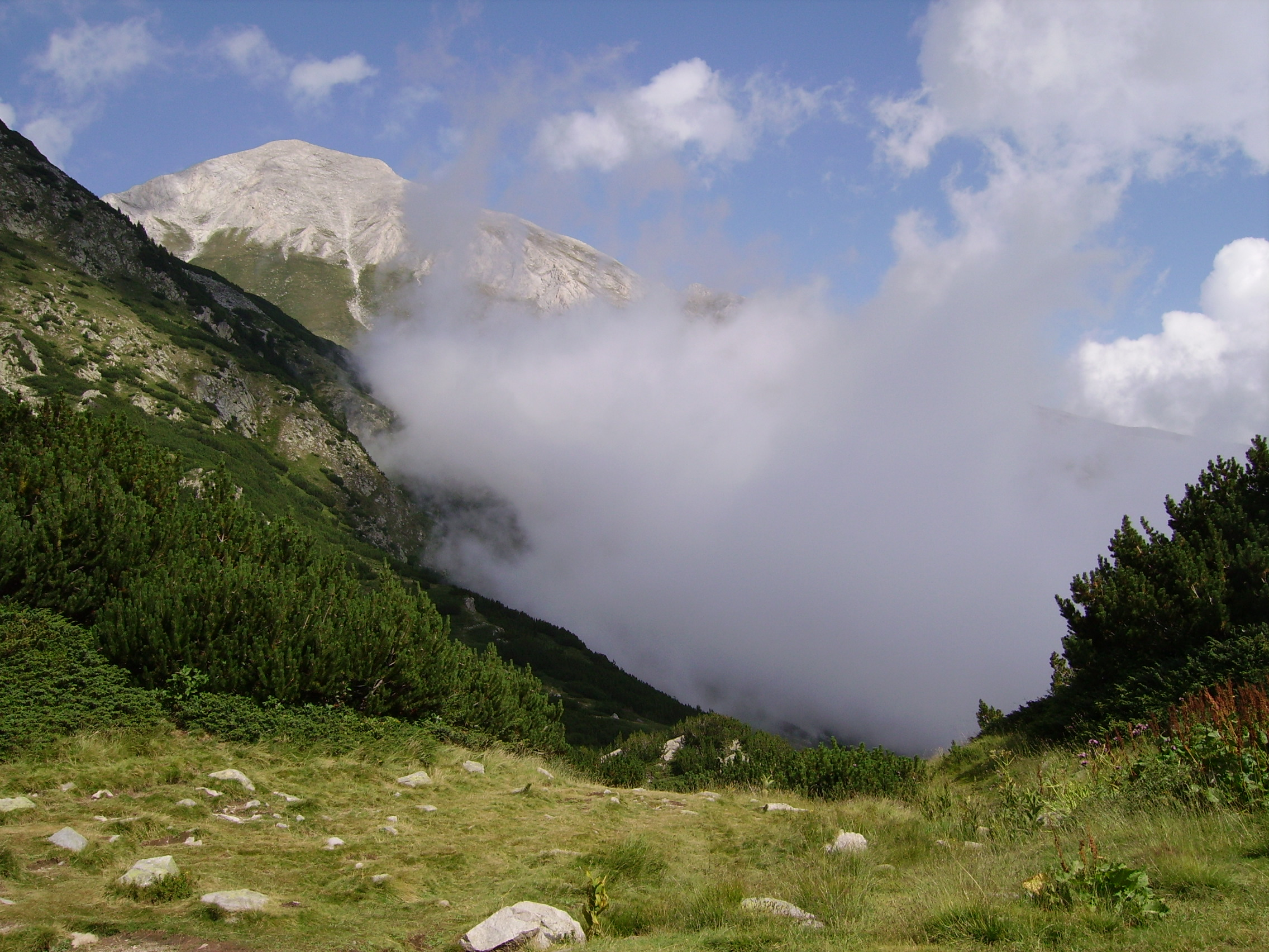 Пирин, Пирин